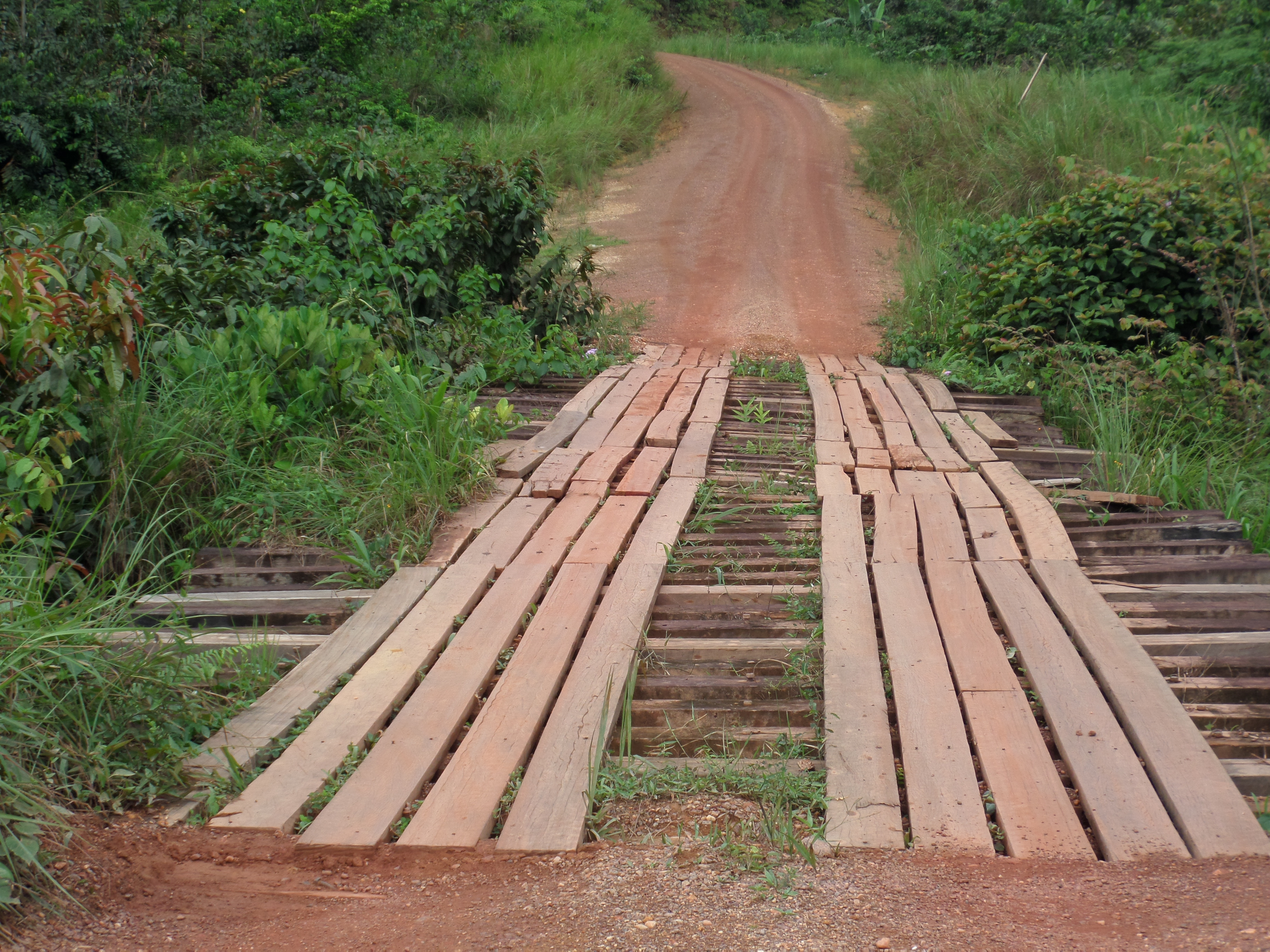 Pont sur la rivière Ogoulou près de Mimongo